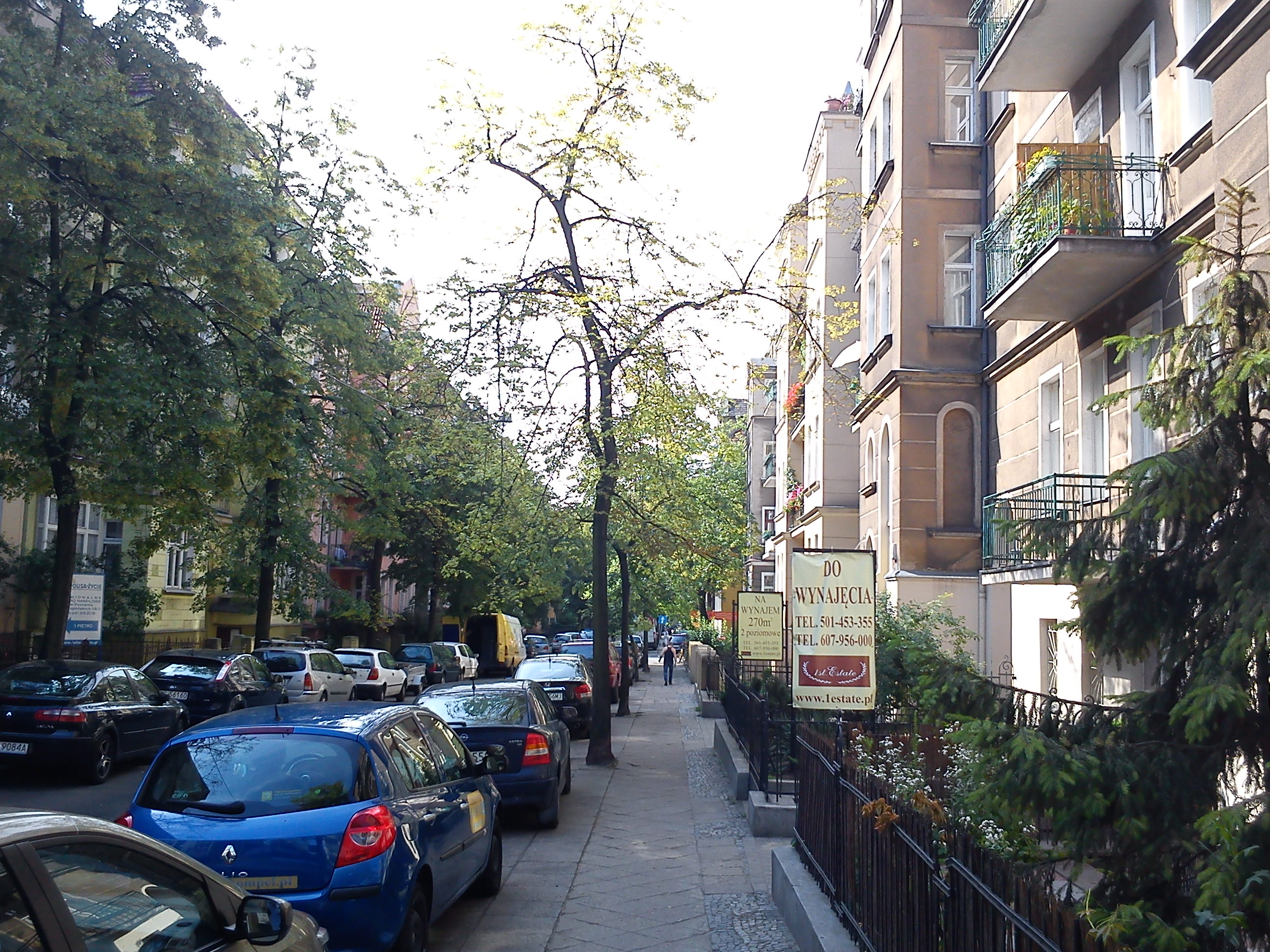 Poplińskich street, Poznań.